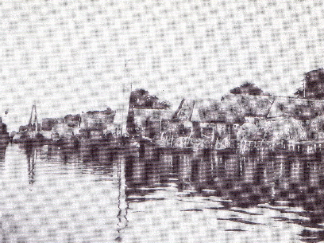 Alte Fotografie des Dorfes Gilge am Gilgestrom im Memeldelta